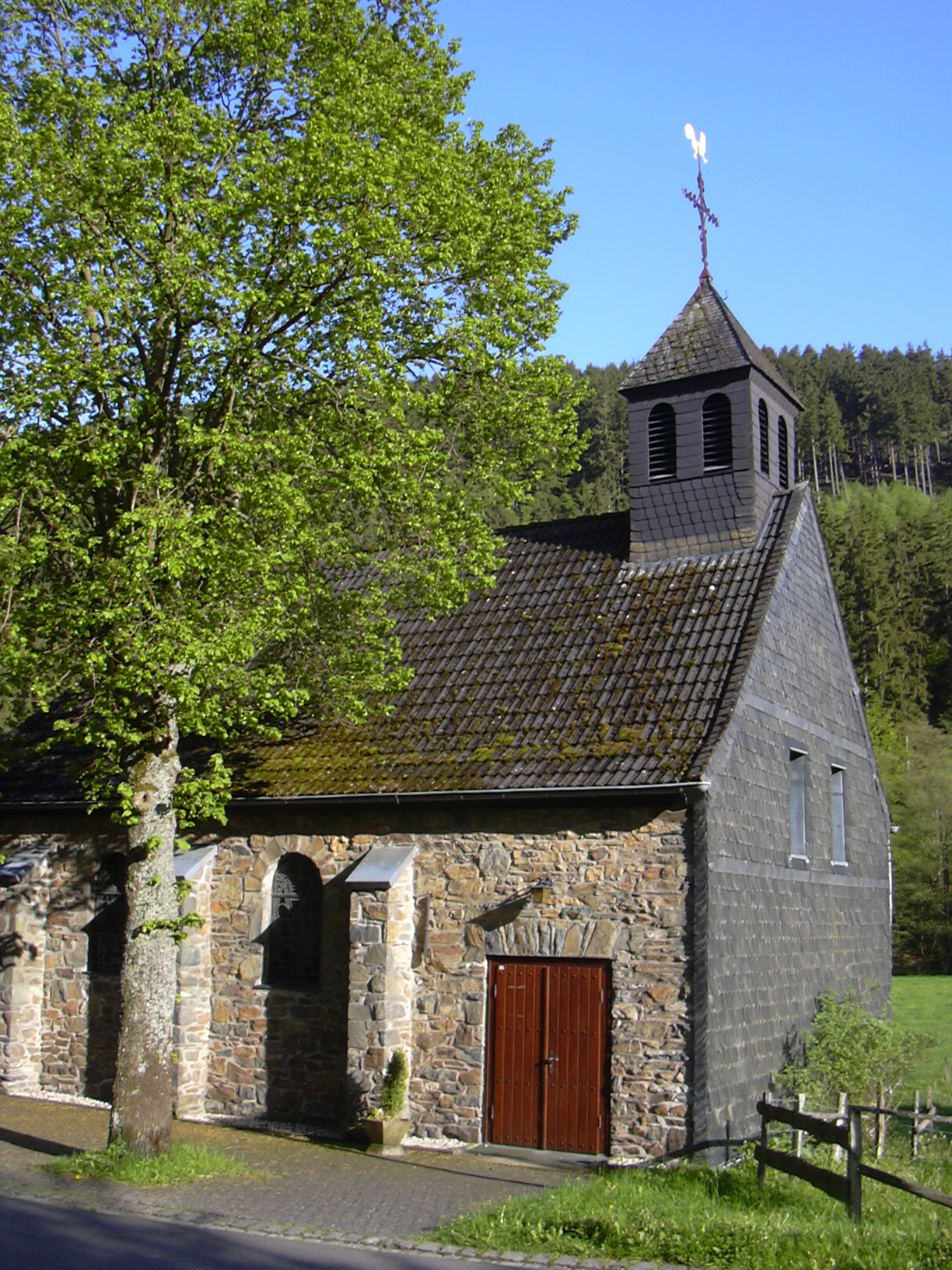 Erkensruhr, Chapel